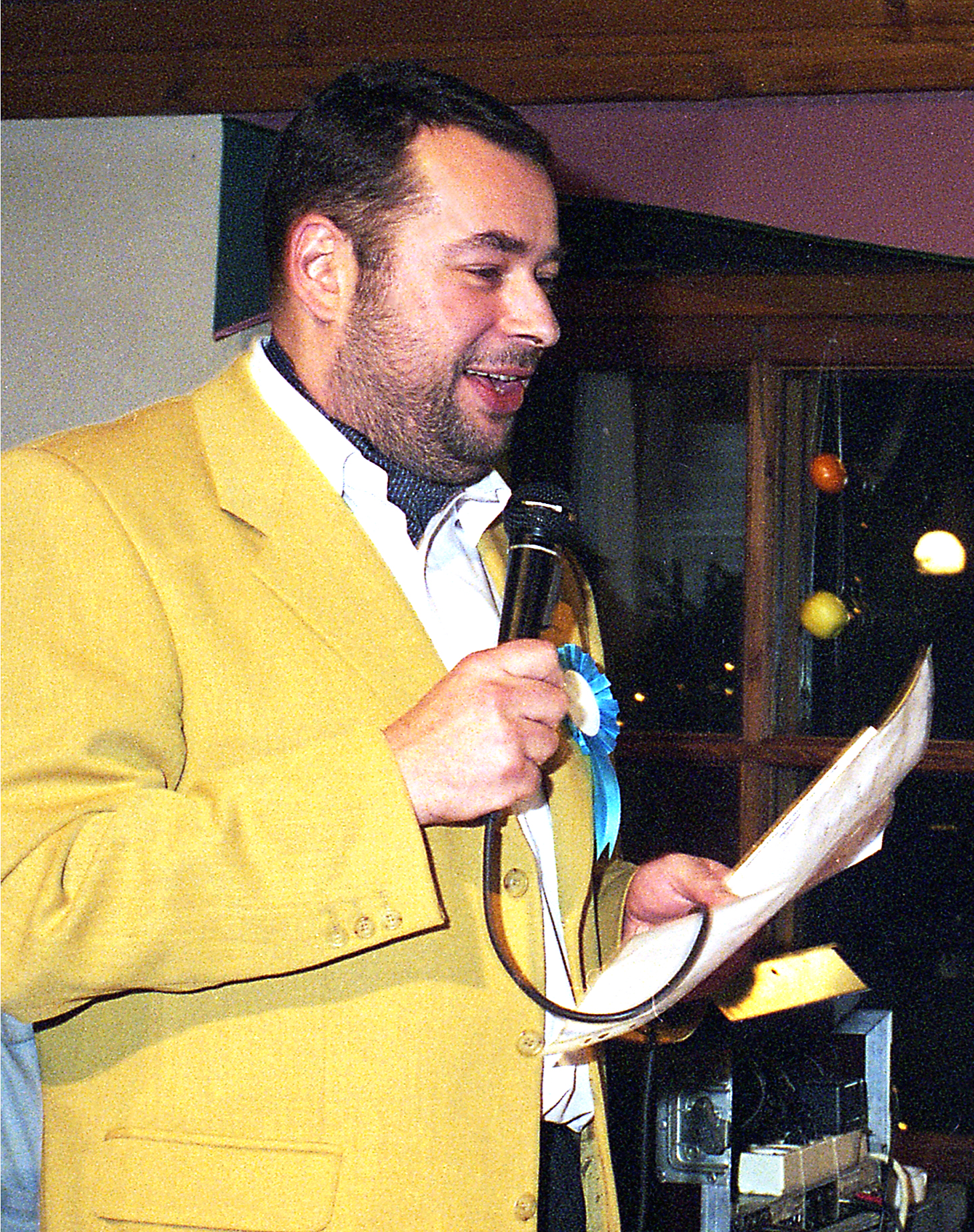 Peeter Oja, näitleja ja koomik 98